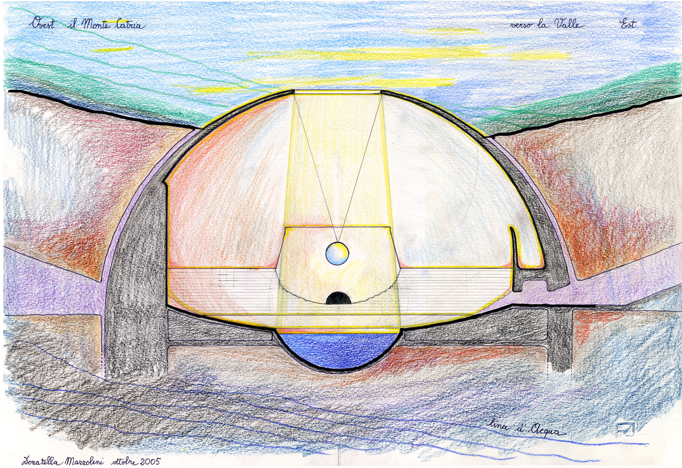 disegno progetto dell'architetto Donatella Mazzoleni